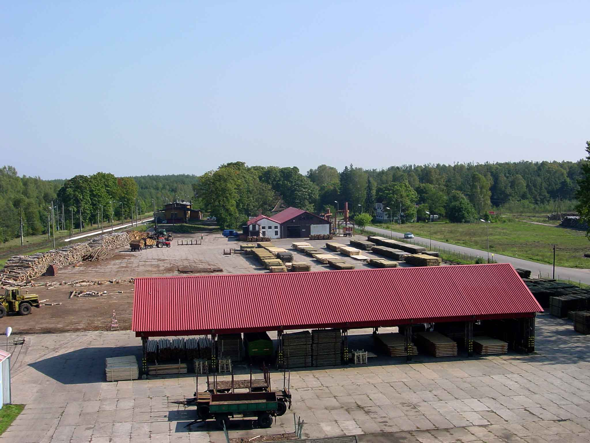 Gmina Tychowo, Podborsko- Zaklad drzewny; autor zdjęcia Kluka; 12.10.2003r.